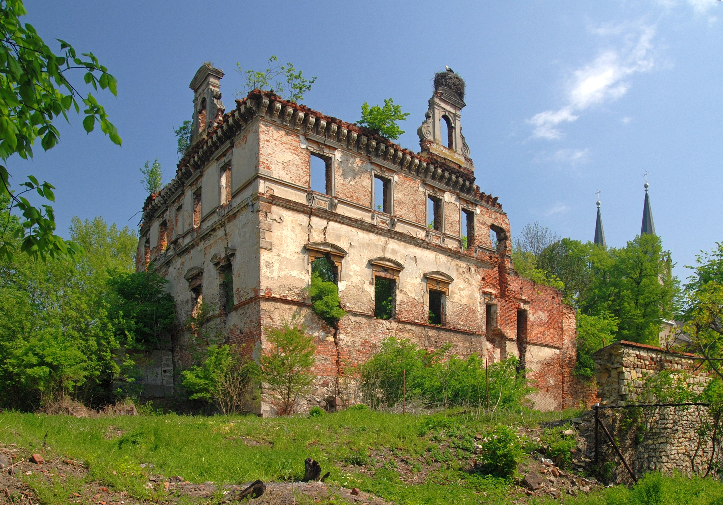 miasto Ujazd